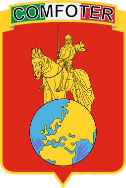 Distintivo del Comando Forze Operative Terrestri, costituito nel 1997 e trasformato nel 2016 in Comando Forze Operative Terrestri e Centro Operativo Esercito.